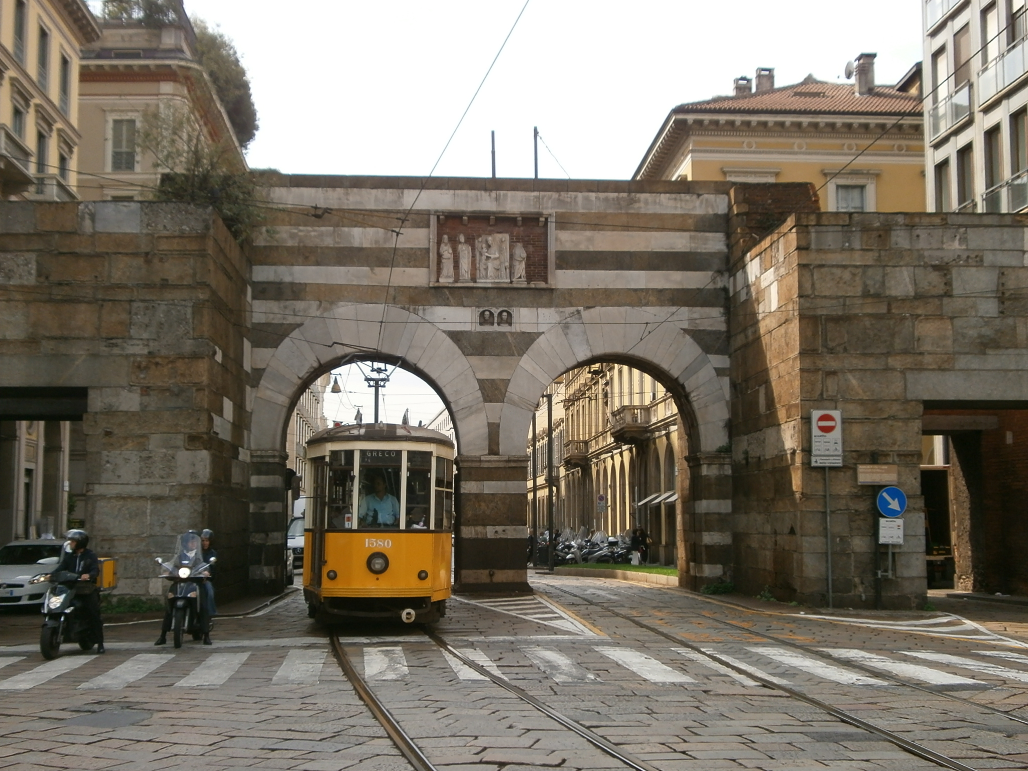 Antica Porta Nuova - Milano - 04